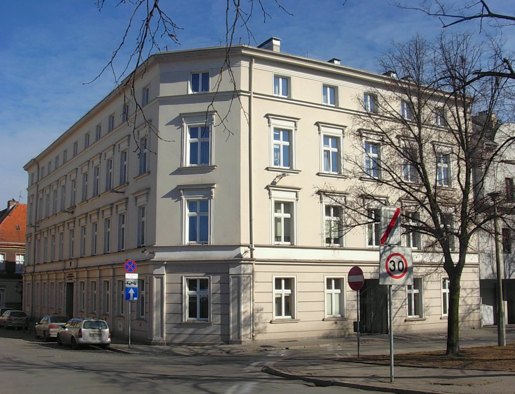 Wojewódzki Sąd Administracyjny w Bydgoszczy